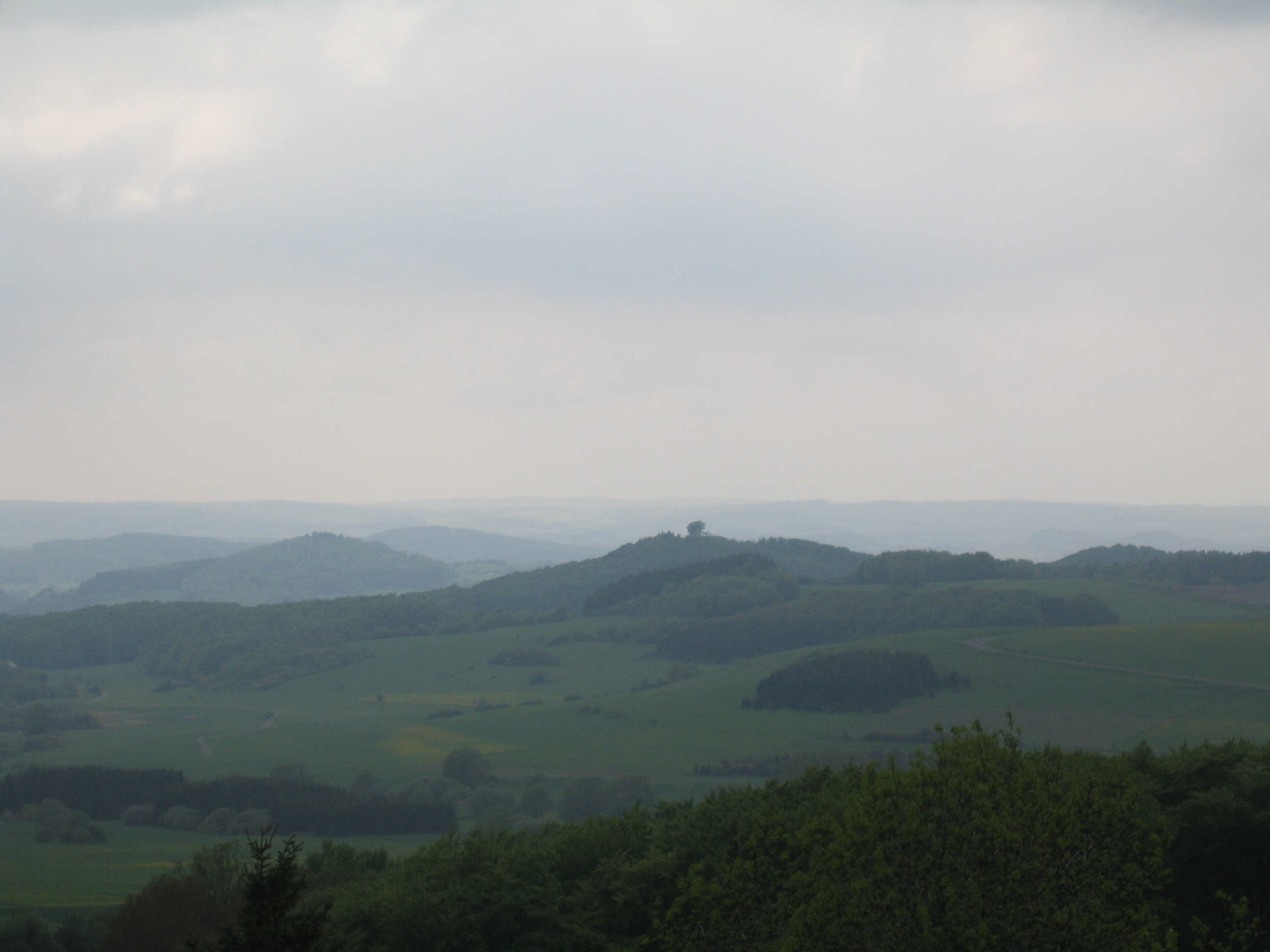 Der Alte Voß von der Dietzenley aus gesehen